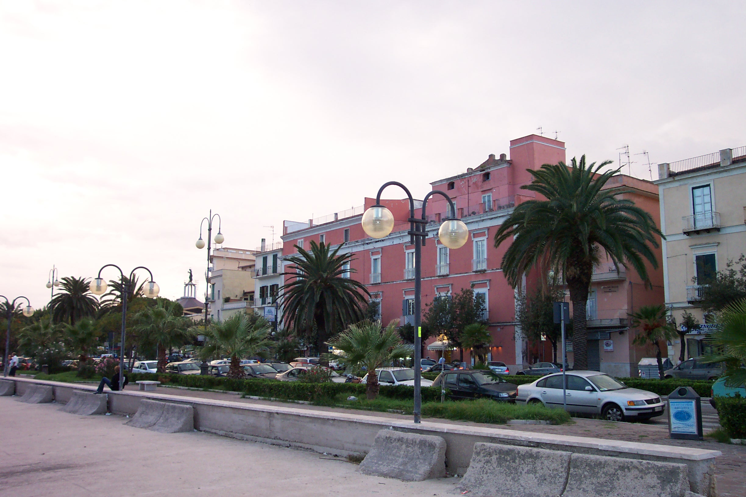 Gaeta, Lazio, Italy